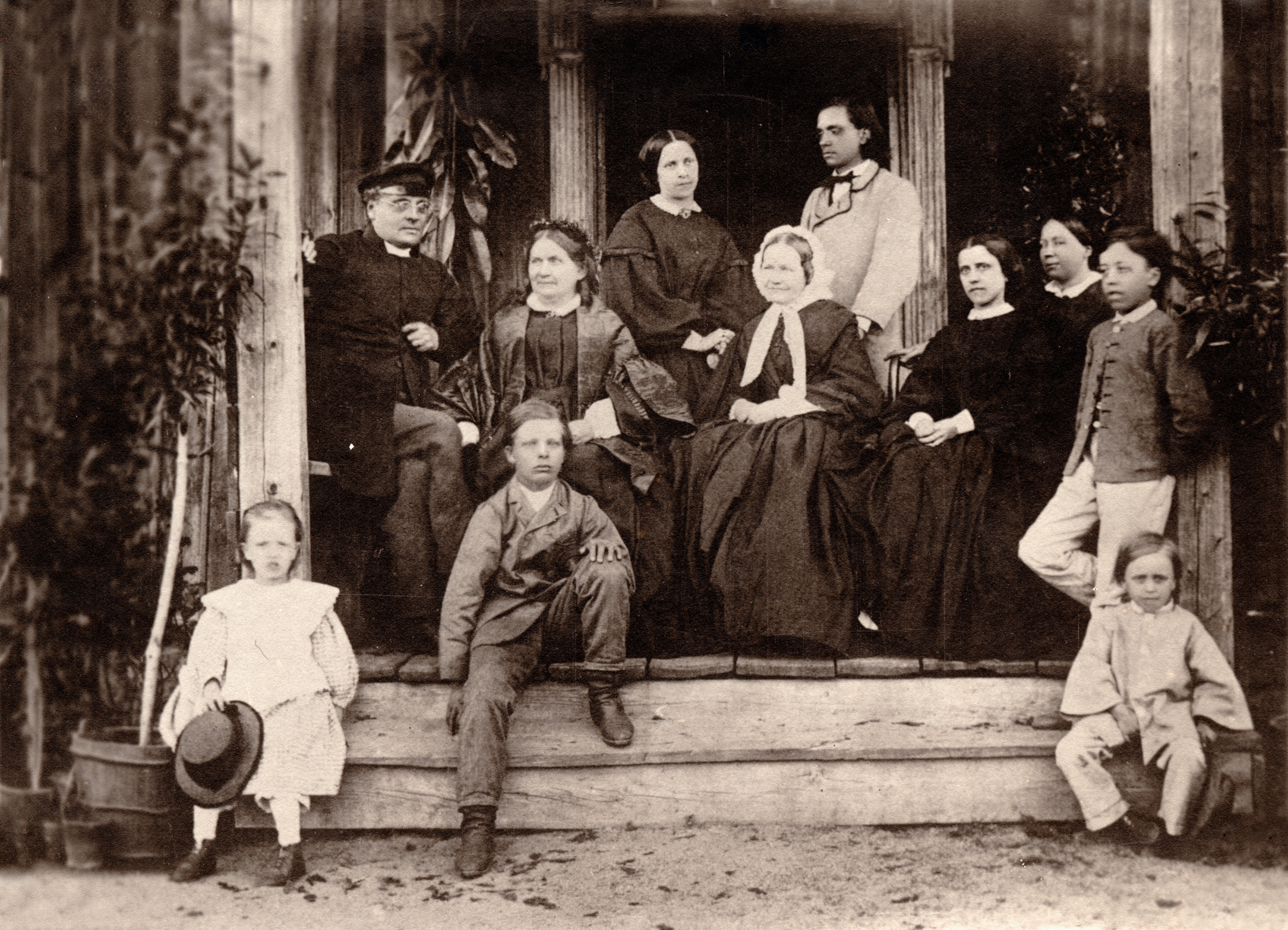 Reprokopia av gruppbild på Kroksnäs trappa, ursprungligen fotograferad av Alfred Ottelin i juni 1863. J.L. Sittande: Johan Ludvig Runeberg (i skärmmössa), Fredrika Runeberg, änkeprofessorskan Carolina Tengström, änkeprofessorskan Natalia Castrén f. Tengström, doktorinnan Sofie Nordström f. Ottelin och Robert Castrén. Bakom stående: änkeprofessorskan Sofi Kellgren f. Tengström och Johan Wilhelm Runeberg. Nere på trappan sittande Hanna Tikkanen, Fredrik Runeberg och J.J. Tikkanen. Signum: slsa1160_405